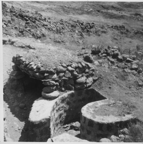 מבט ממצדית בחלק הצפוני של תל-פאחר אל הגאיון שבין שתי הכיפות (ואדי אל-חצין)